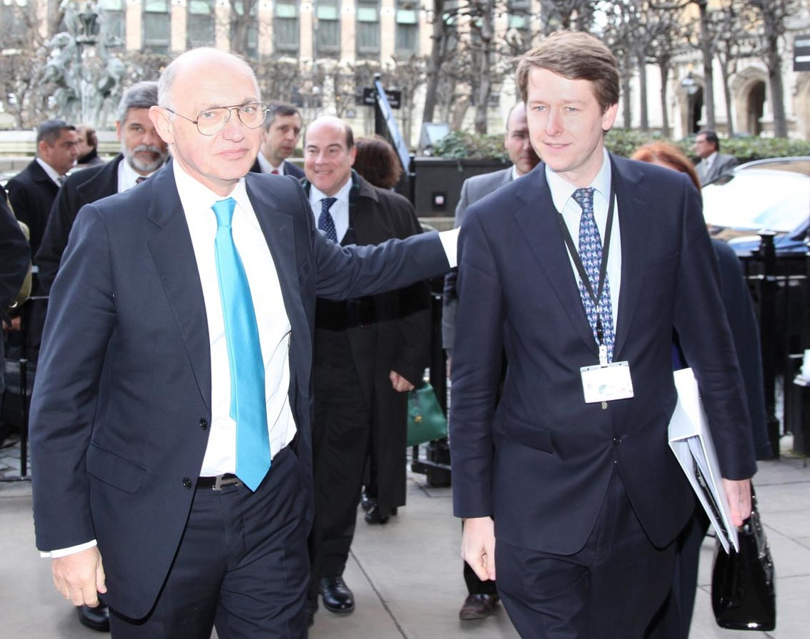 5 Parlamento